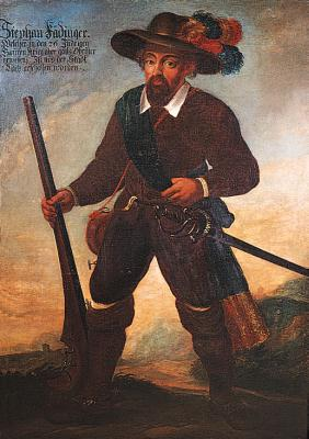 Stefan Fadinger (c. 1585-1626) der Bauernkämpfer